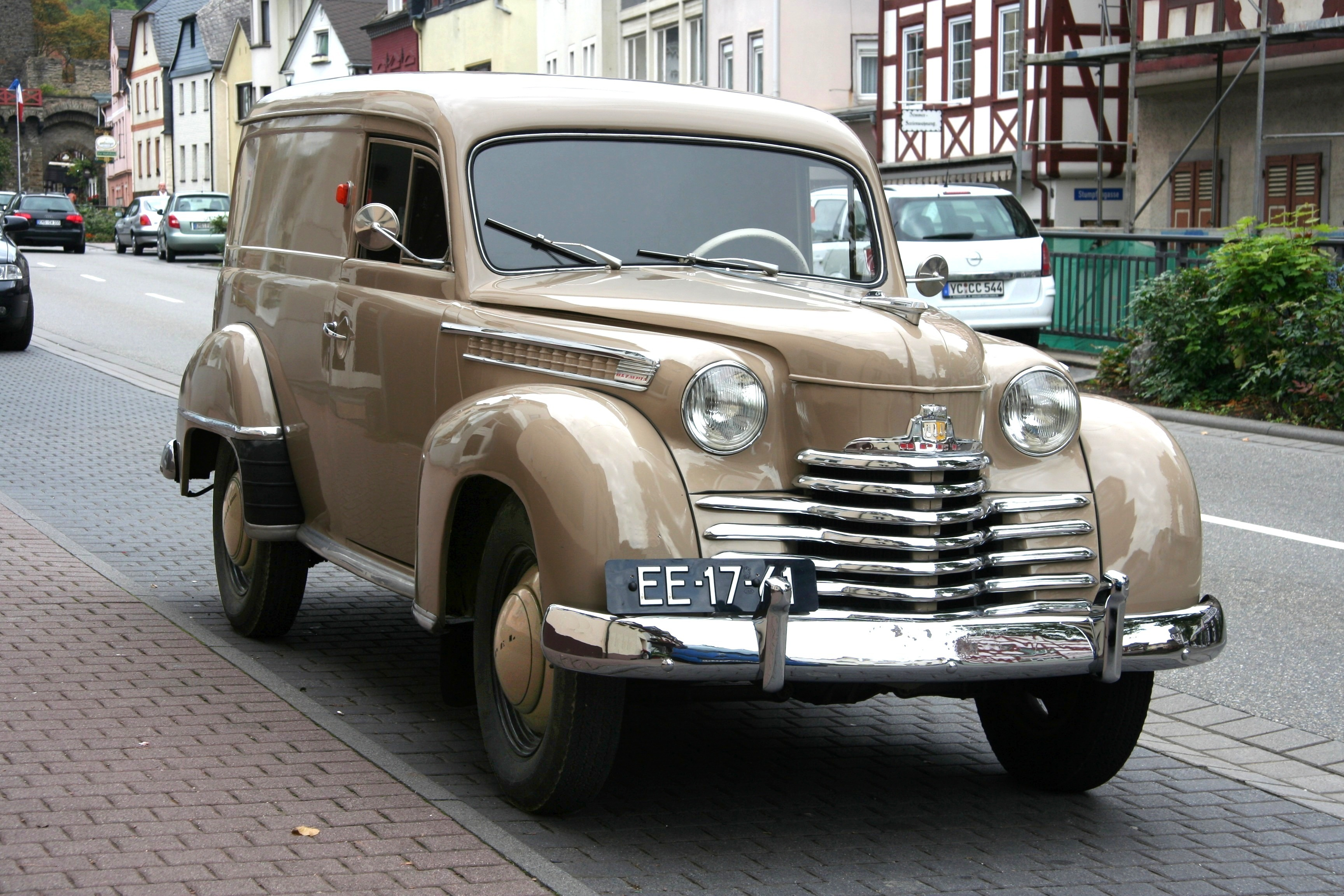 Opel Olympia Kastenwagen, Baujahr 1951 (Blinker und Spiegel nicht serienmäßig; Phantasiekennzeichen)